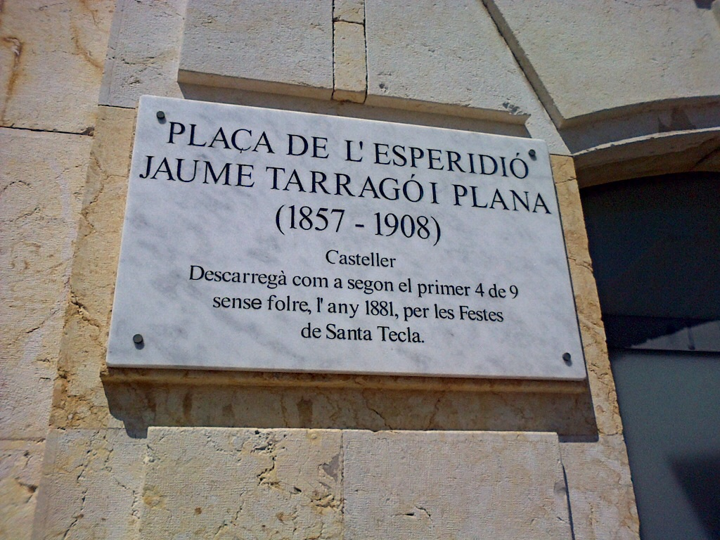 Plaça de l'Espiridió de Tarragona, Jaume Tarrago i Plana, llegendari casteller que descarregà com a segon el primer 4de9 net a les festes de Santa Tecla l'any 1881